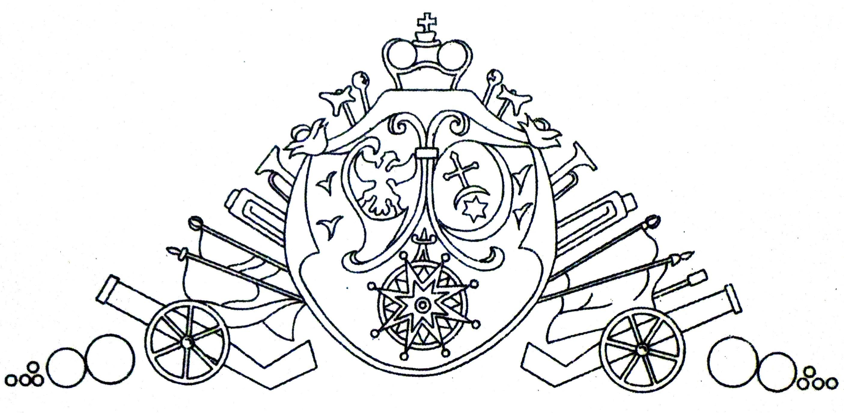 Картуш франтона цэнтральнага ўваходу Нясвіжскага палацу